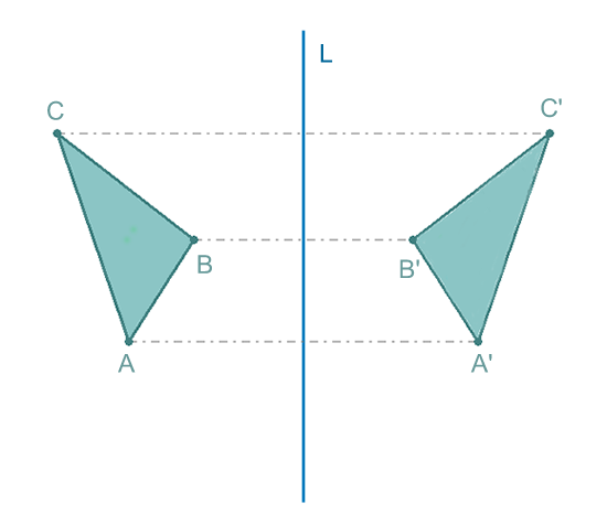 Simetría, simetría de un triángulo , transformaciones isométricas, Geometry